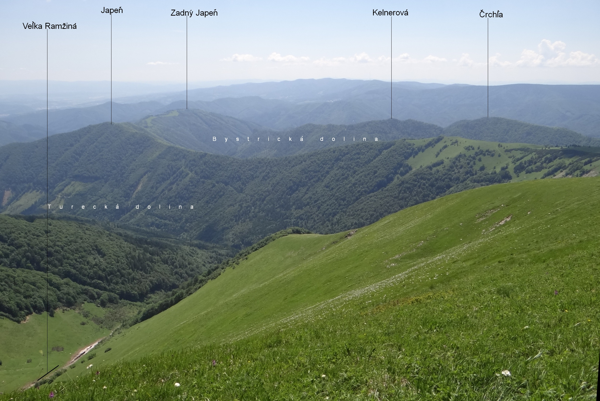 View from Krížna